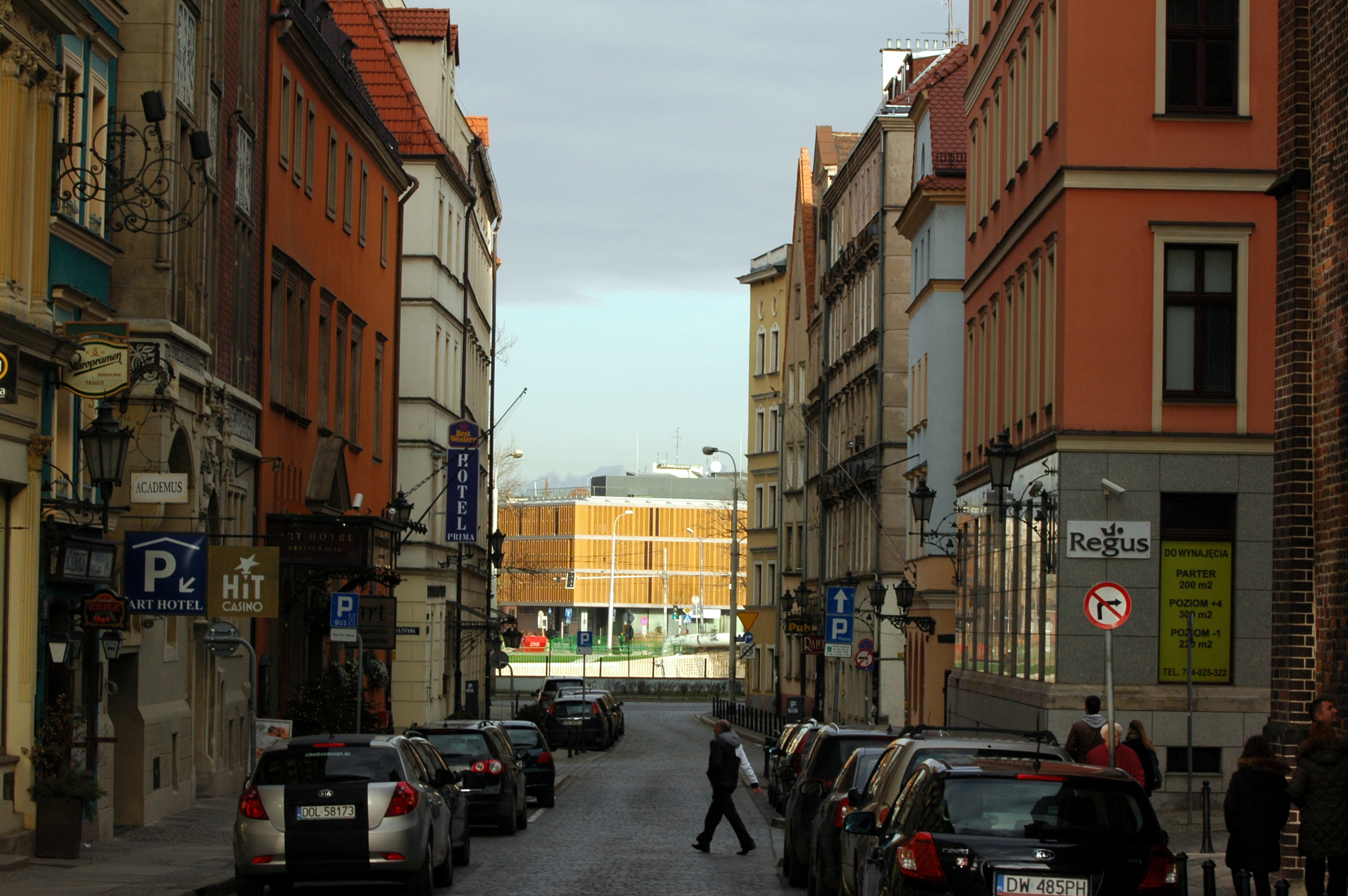 ulica Kiełbaśnicza we Wrocławiu w 2015 roku